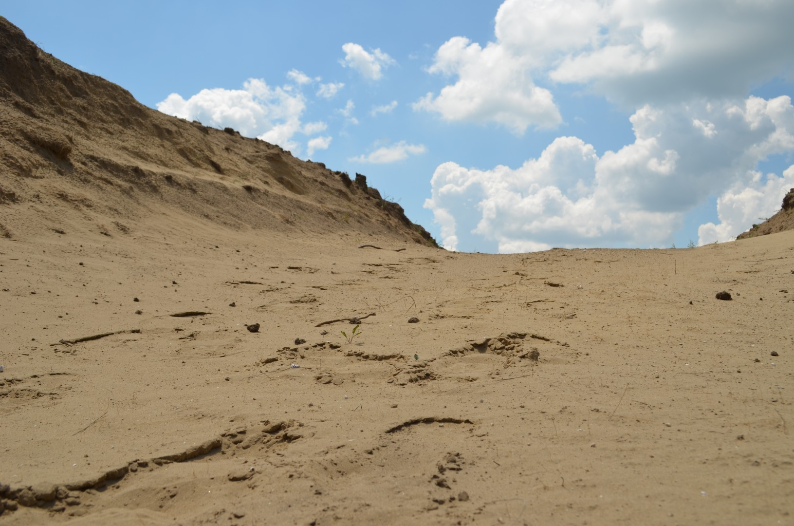 Српски (ћирилица): Пешчара Ово је фотографија заштићеног природног добра у Србији под шифром: РП03 This is a a photo of a natural area in Serbia with ID: РП03